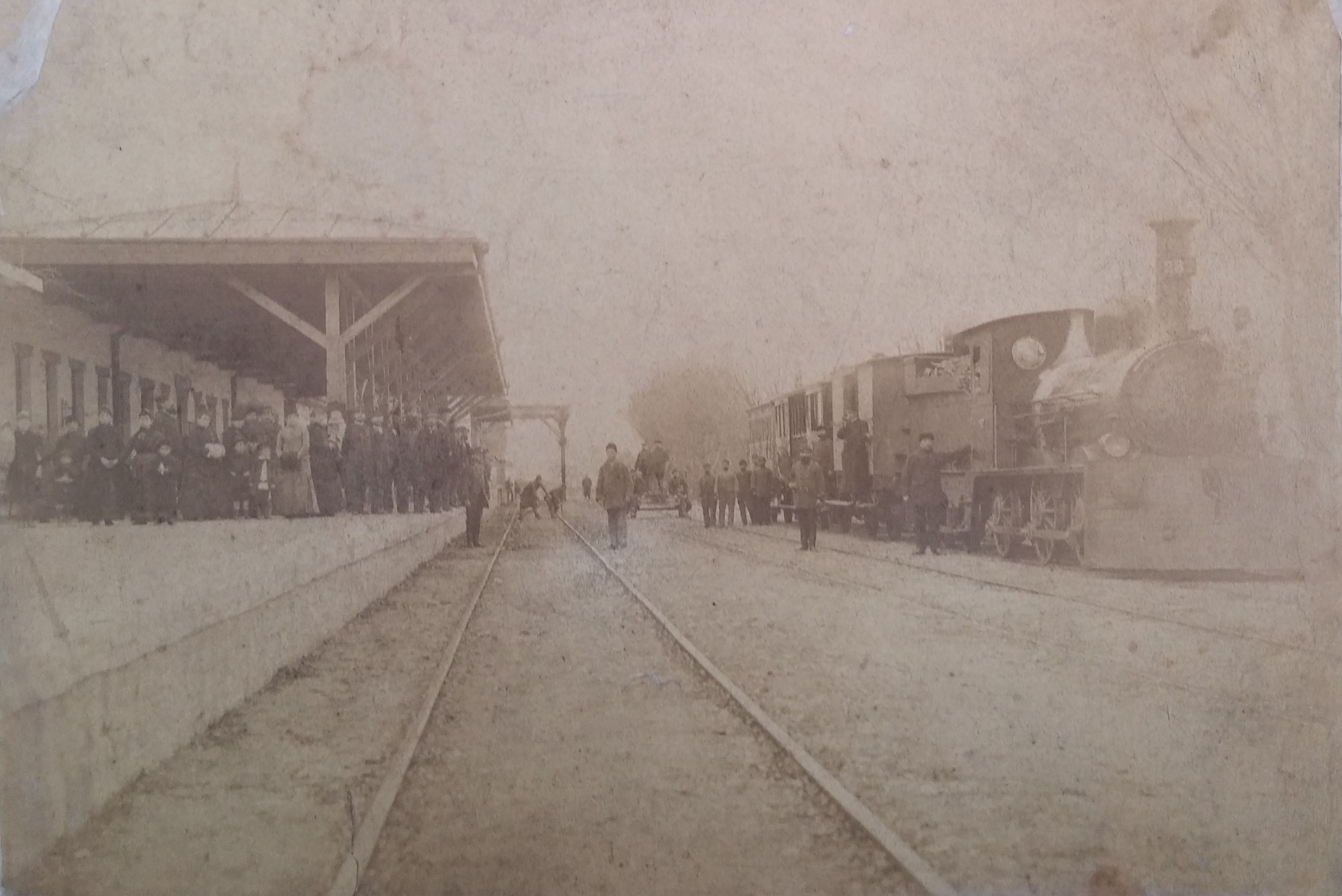 Варна. Новата жп гара. Пристигането на първия влак на БДЖ.